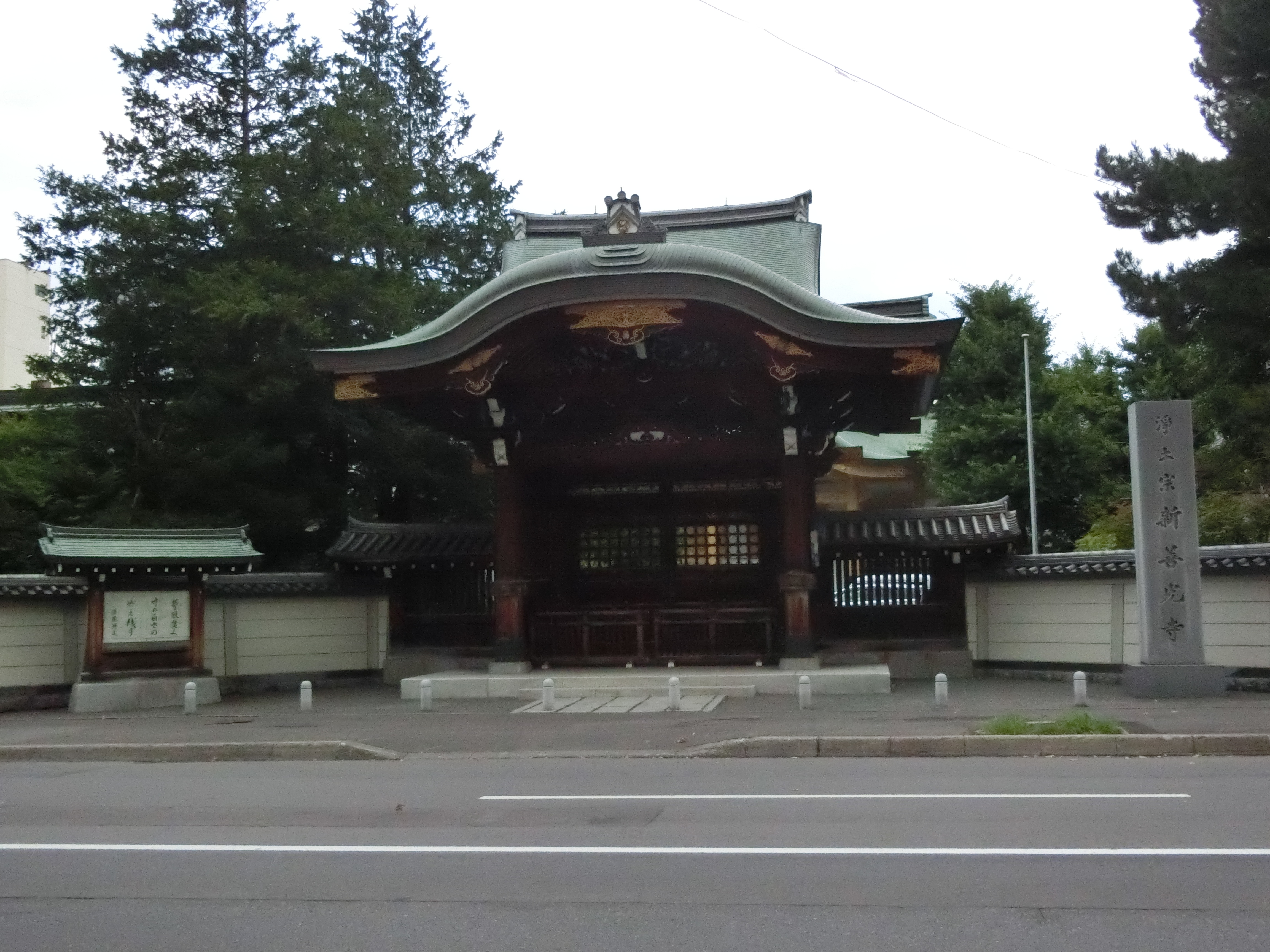 札幌市中央区の南6条西3丁目にある新善光寺